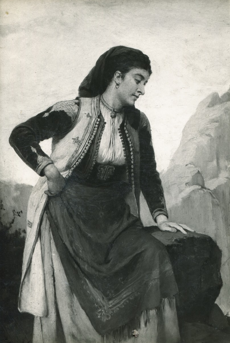 id. Vastagh György Montenegroi nő, illusztráció Mara Cop-Marlet Südslawische Frauen c. könyvéhez